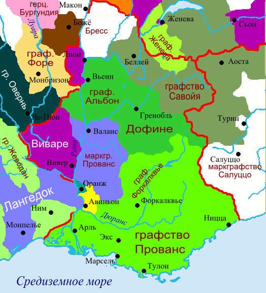 Нижняя Бургундия в 1200 г.